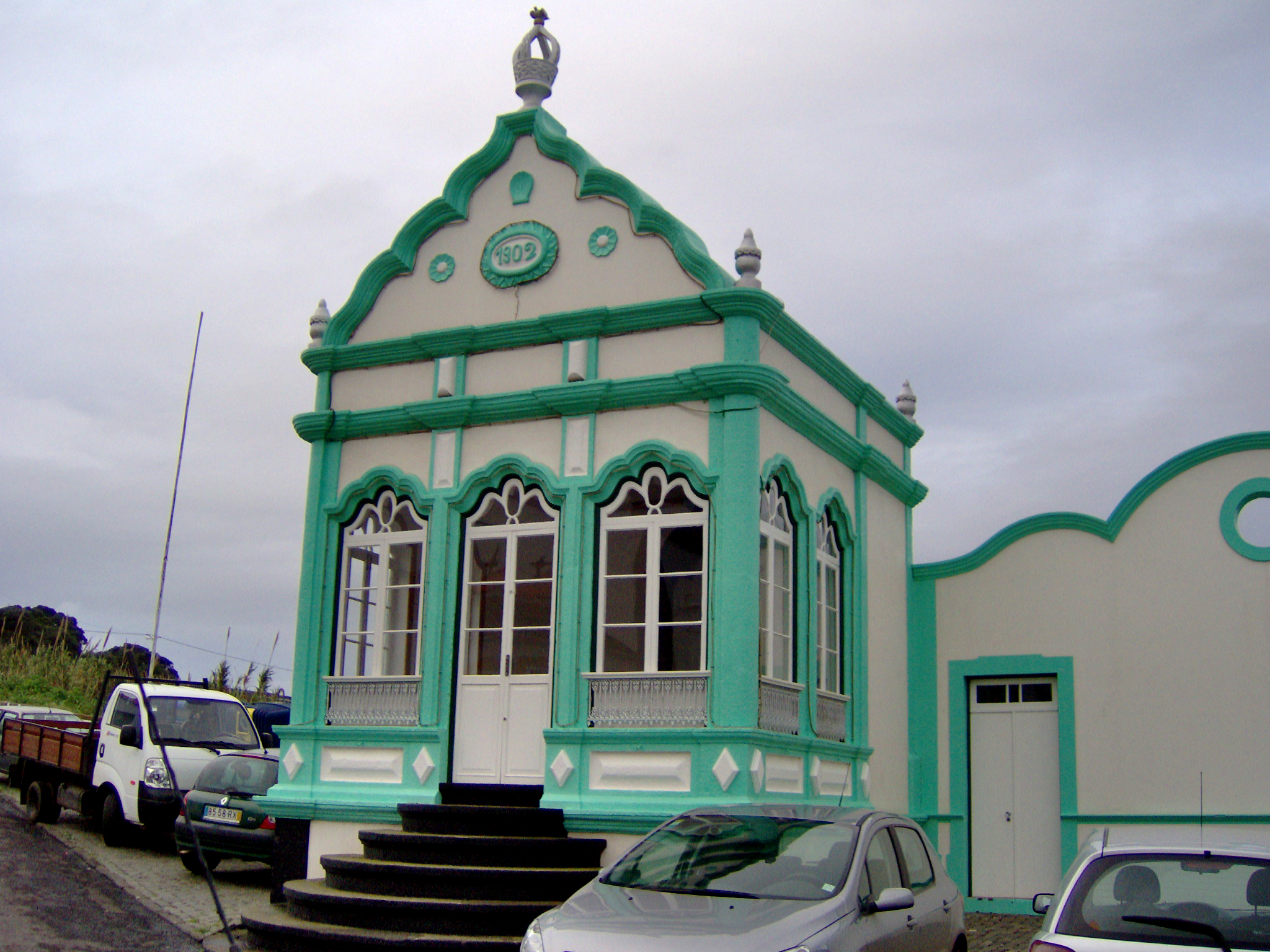 Império Divino Espírito Santo do Porto Martins, Praia da Vitória, ilha Terceira, Açores